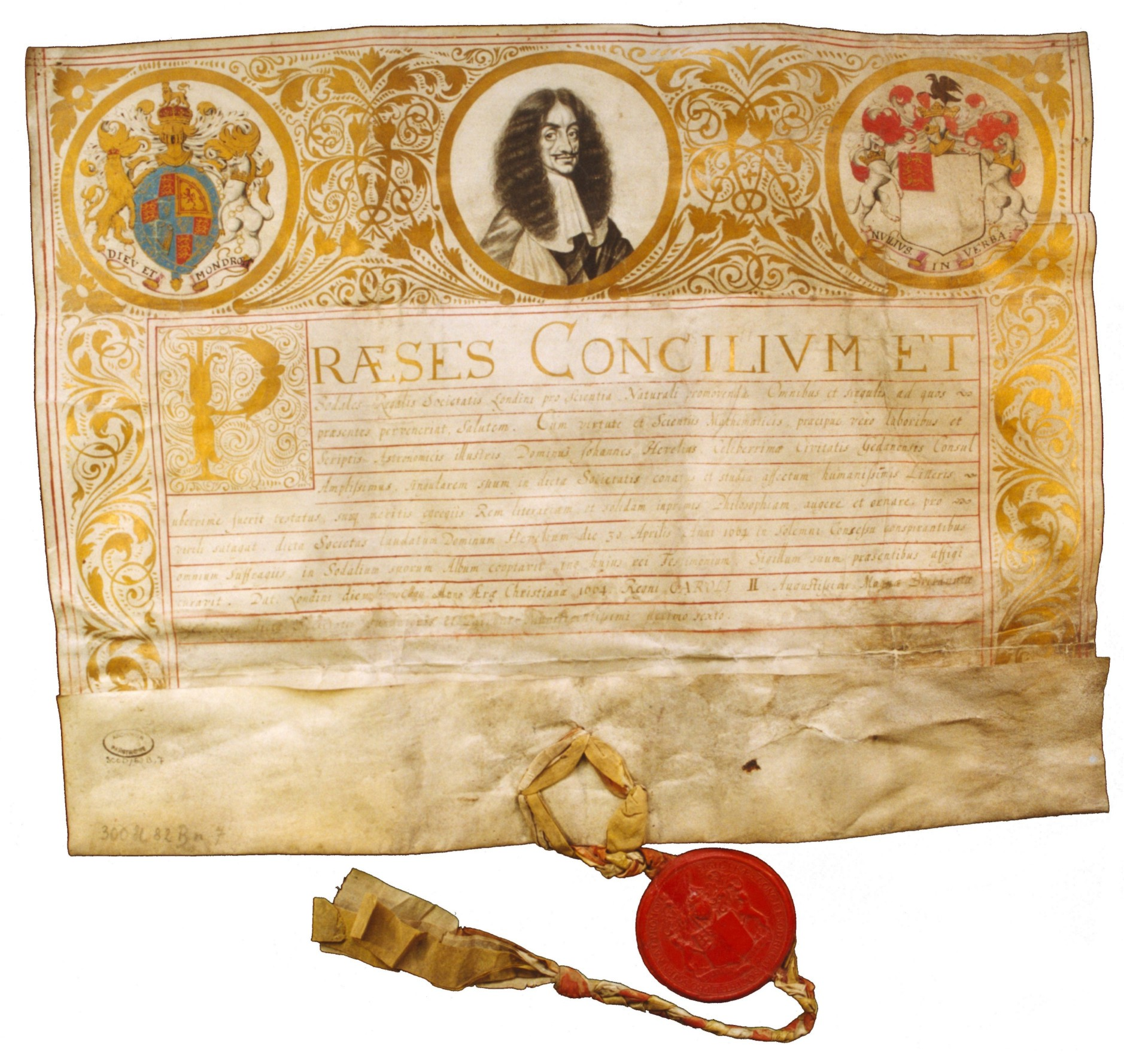 Królewskie Towarzystwo Nauk Przyrodniczych w Londynie nadaje godność członka honorowego astronomowi gdańskiemu Janowi Heweliuszowi. Miejsce: Londyn Opis zewnętrzny: Oryginał, jęz. łaciński, pergamin, 460 x 360 x 76 mm, 1 pieczęć, brak podpisów, 1 karta. Miejsce przechowywania: Archiwum Państwowe w Gdańsku, Akta miasta Gdańska, sygn. 300,D/82B,7. Autor komentarza: Joanna Bławat.